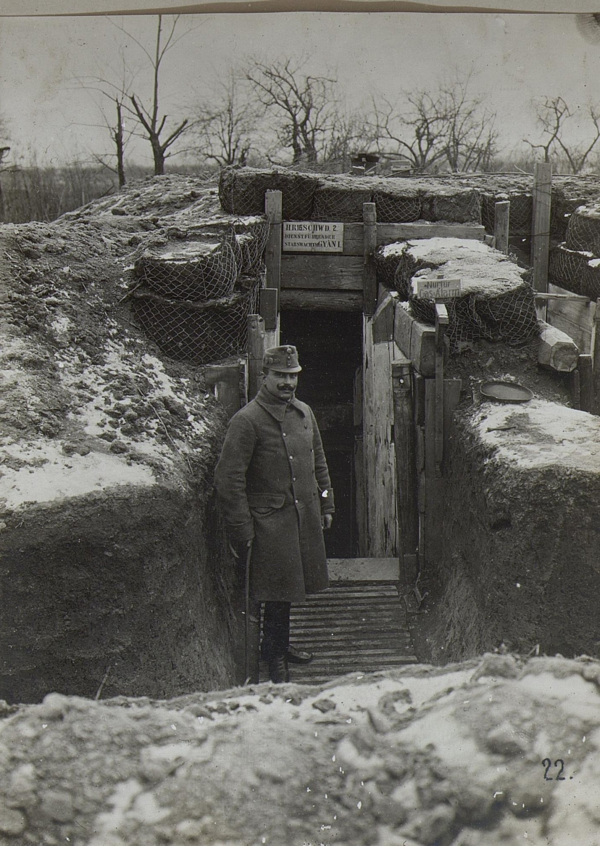 Granatsicherer Unterstand bei den 6er Husaren